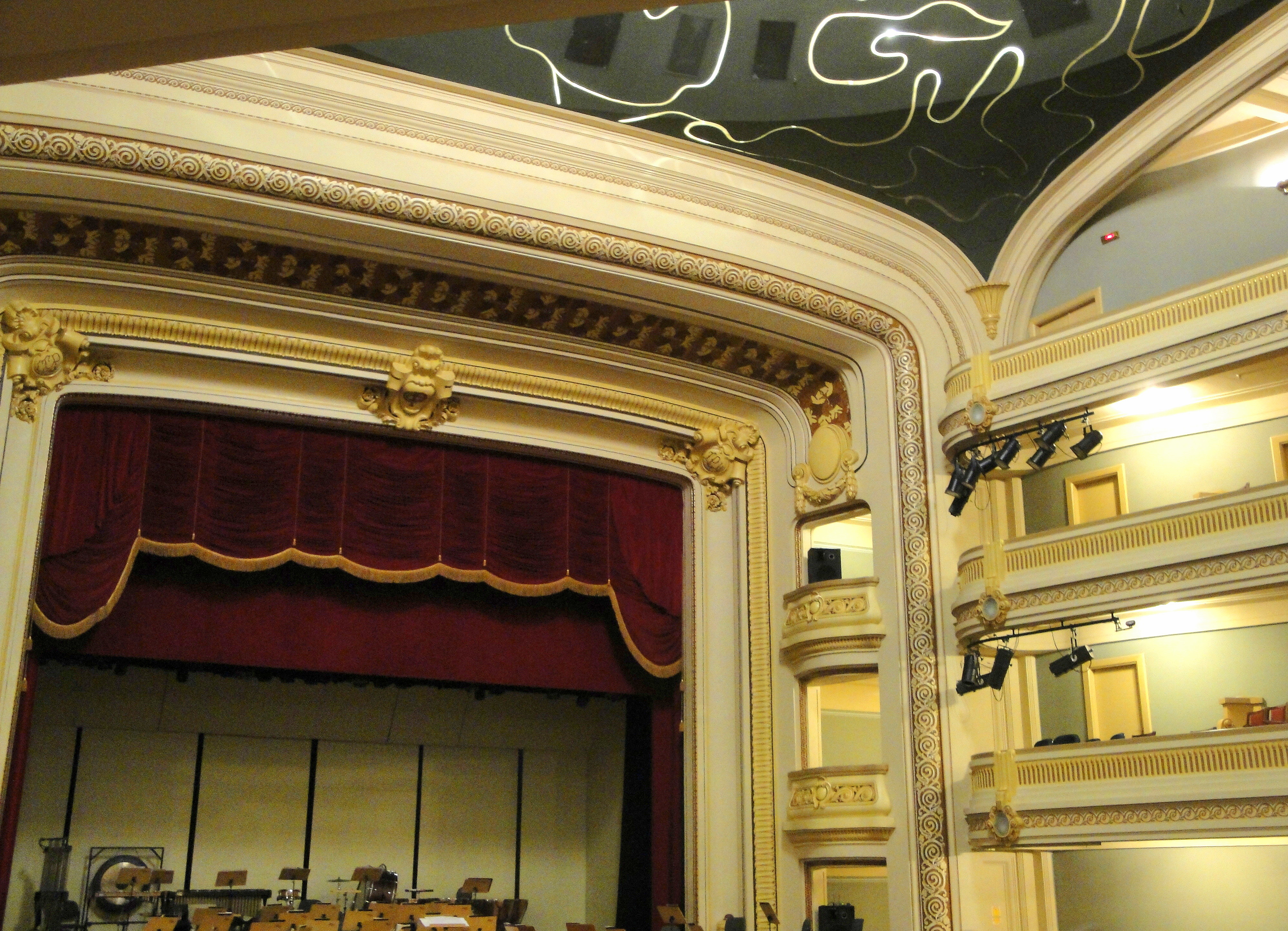 Theatro Pedro IP, em Ribeirão Predo